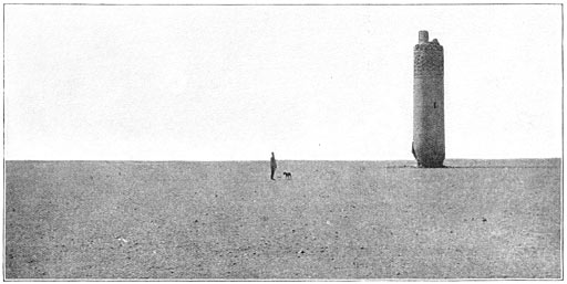 "De Nadirzuil als een vuurtoren in de woestijn" (named after Nadir Shah)